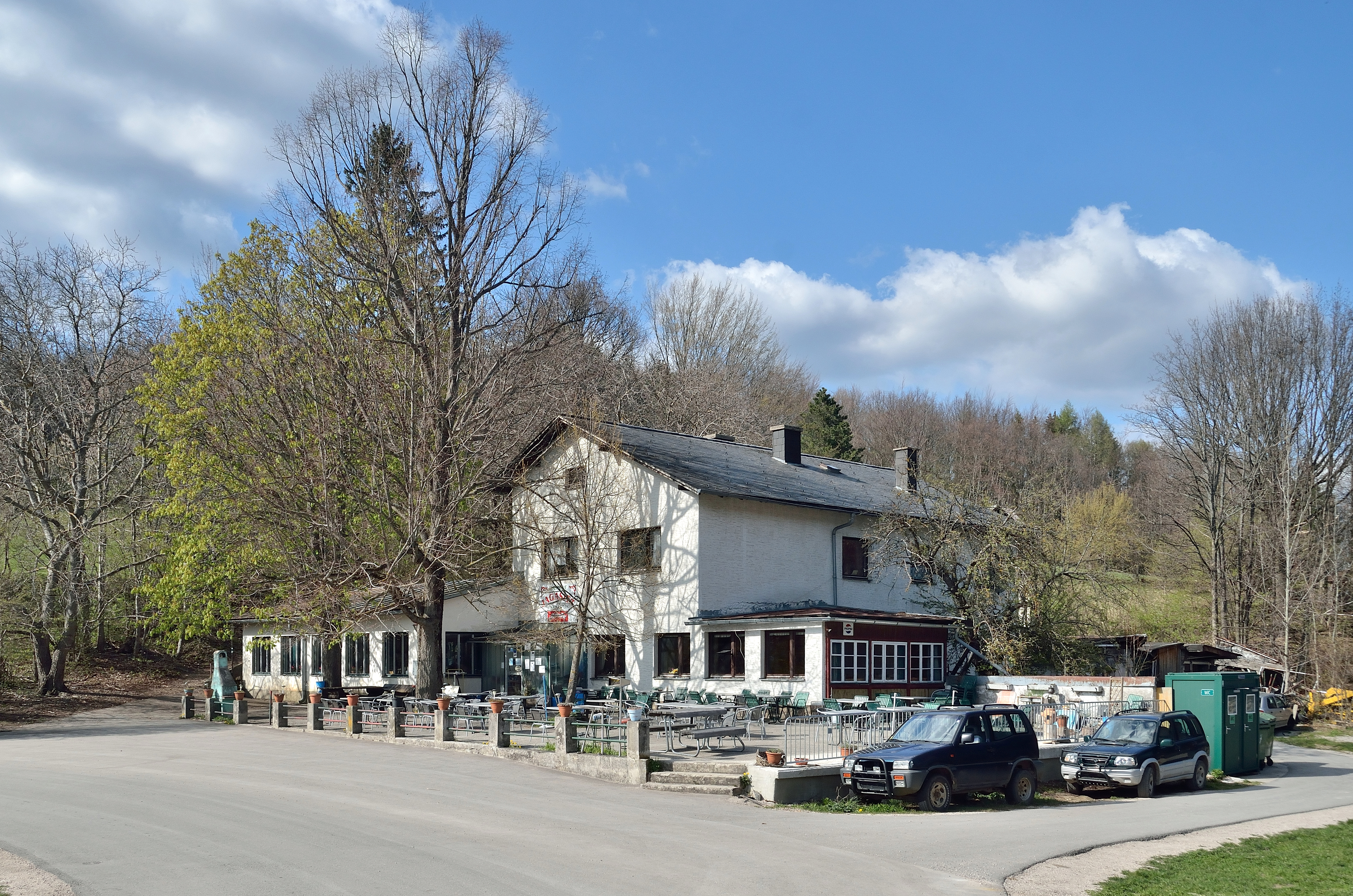 Gasthaus Jagasitz, Muggendorf